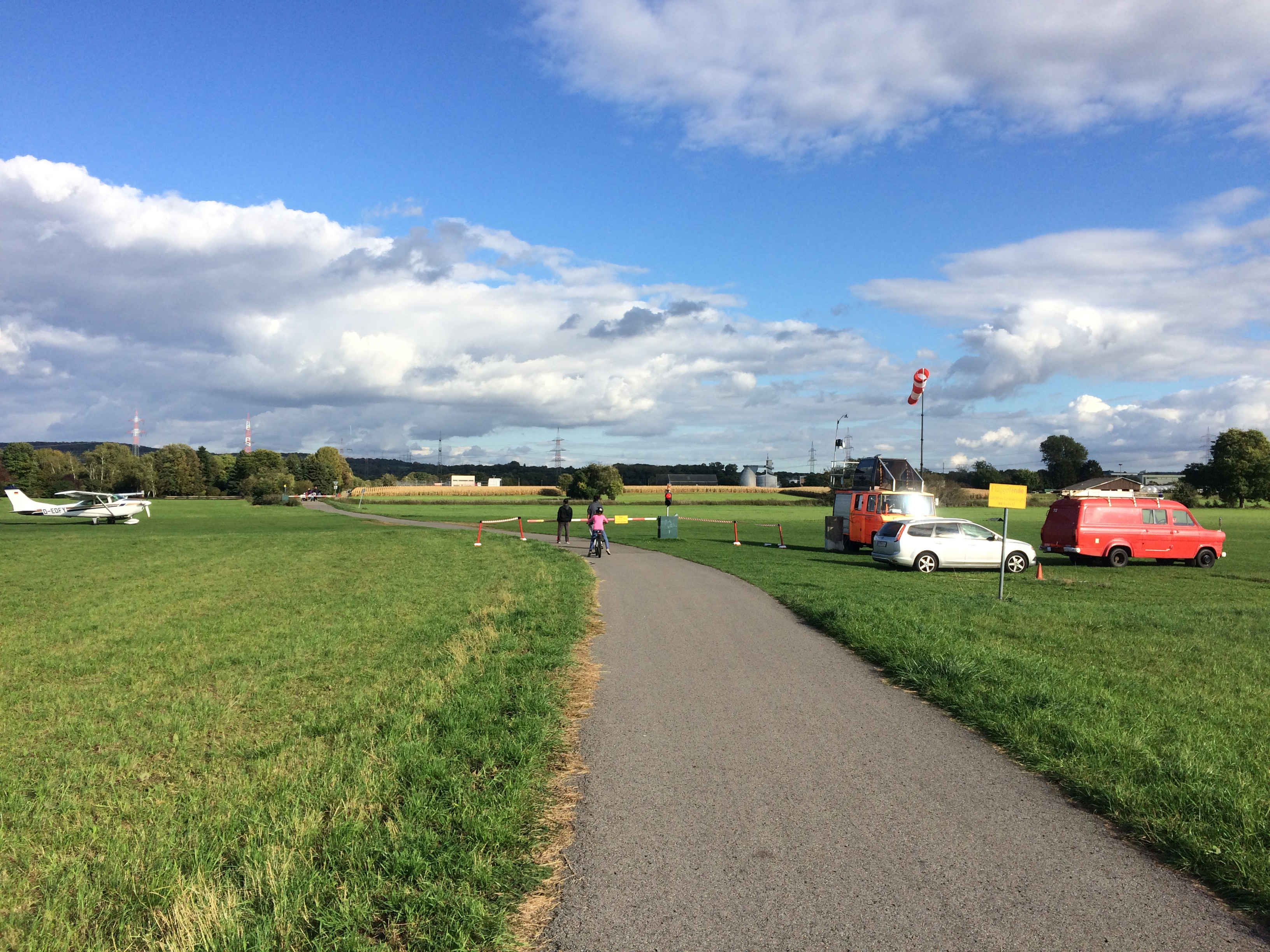 Flugleitung in Walldorf mit geschlossener Schranke und FLugverkehr